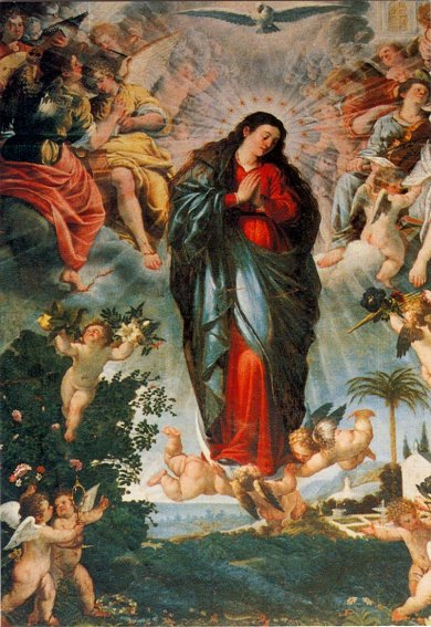 La obra representa la Inmaculada Concepción de la Virgen María, madre de Jesucristo.